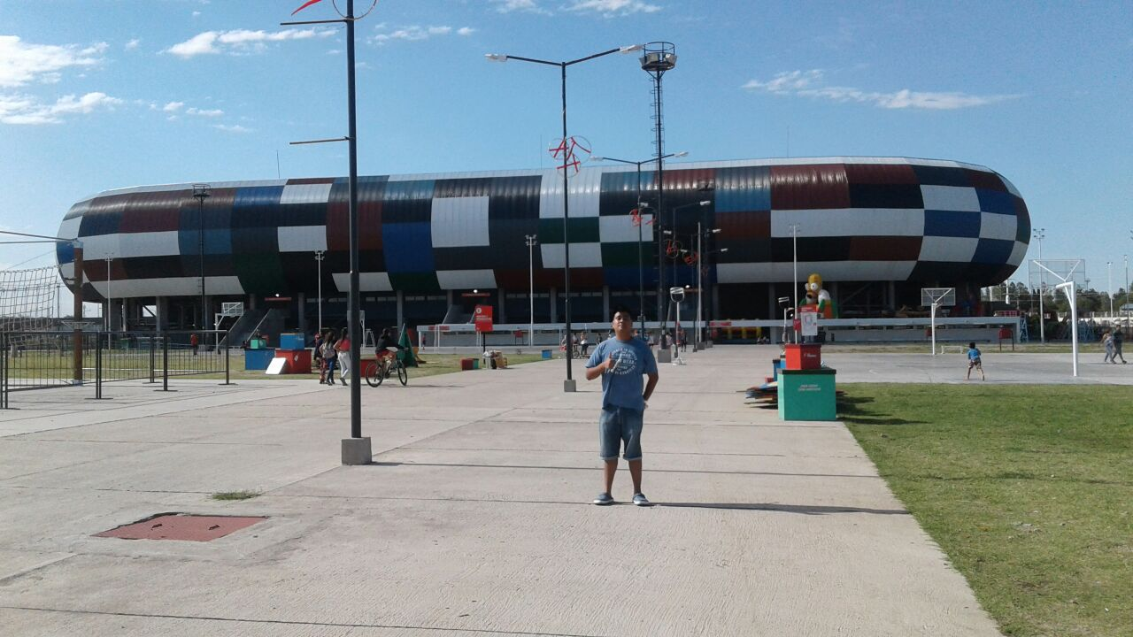 Vista exterior del estadio único de Villa Mercedes, conocido como La Pedrera